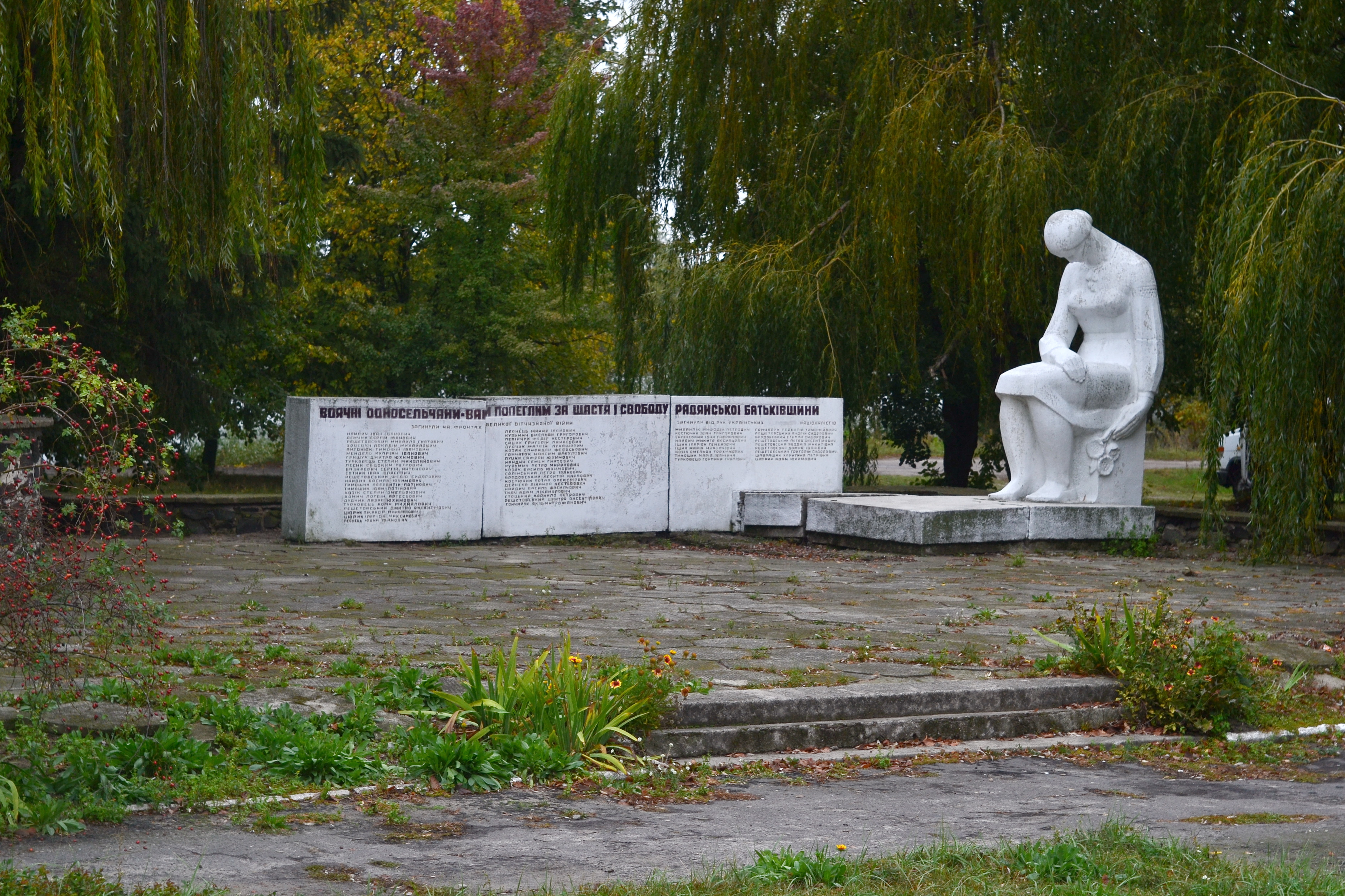 Пам'ятник землякам (1970 рік) - загальний вигляд - Грудки (вул. Соціальна, біля сільської ради) Камінь-Каширський район Волинська область Україна